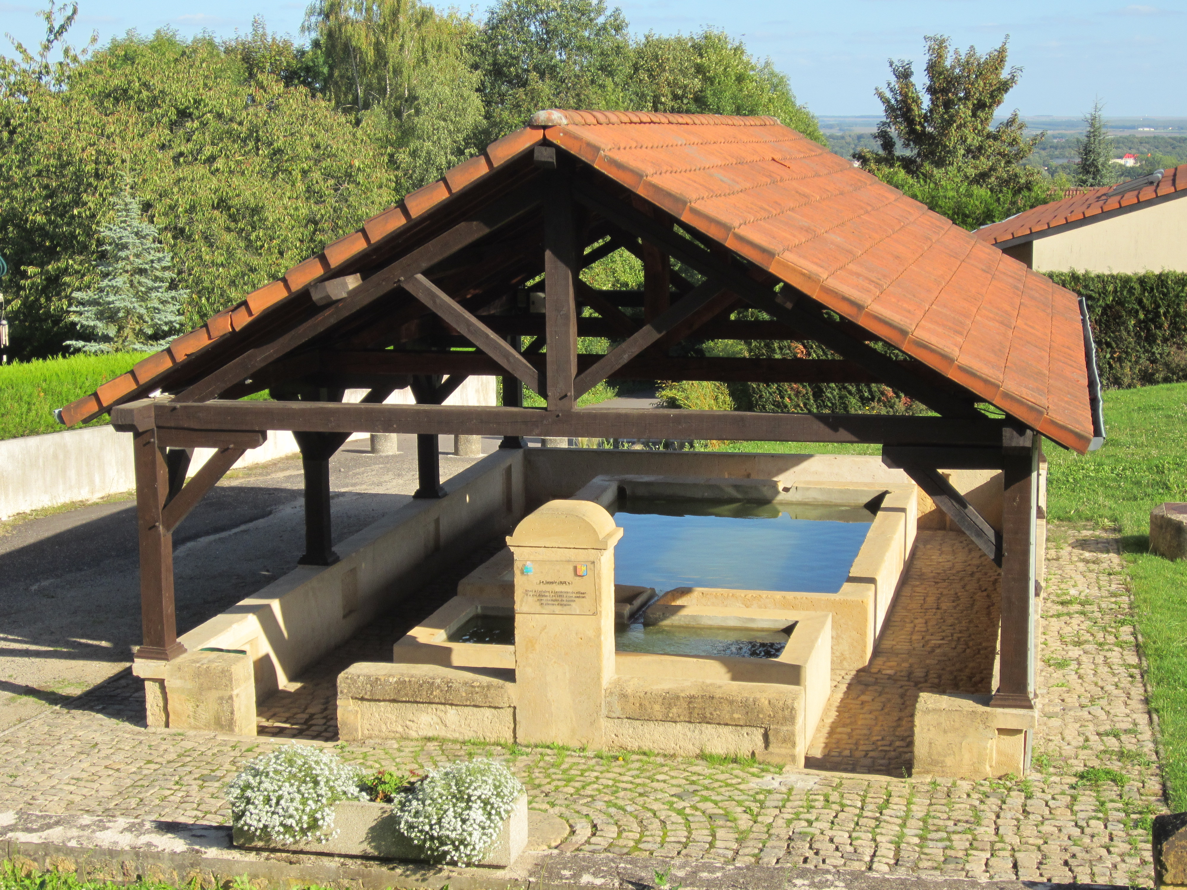 Description lavoir de Jussy Moselle Date14 September 2011Sourcemon appareil photoAuthorAimelaimePermission (Reusing this file) lavoir de Jussy Moselle